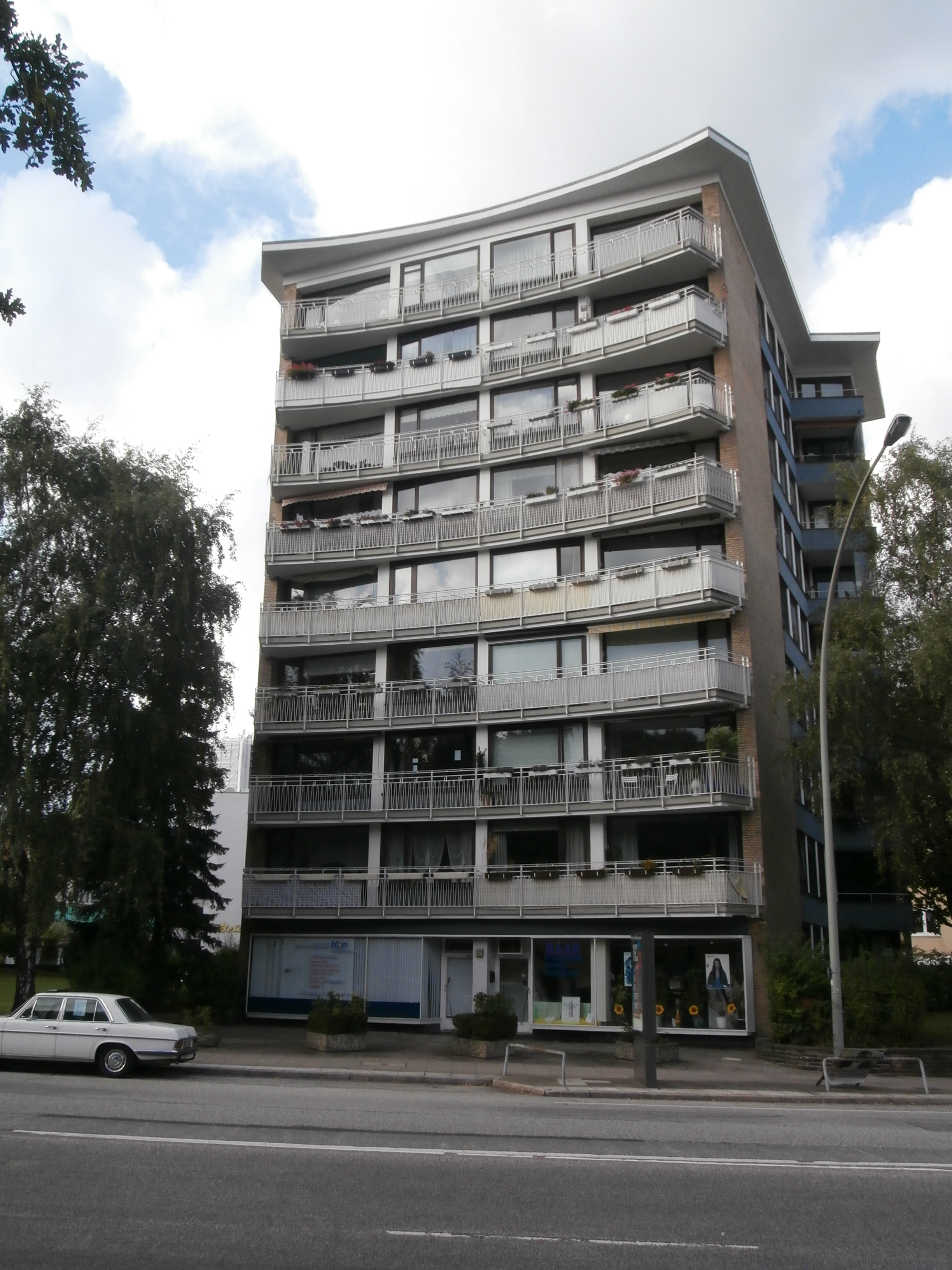 Hochhaus von 1958This is a photograph of an architectural monument.